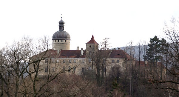 Zamek Grabstejn